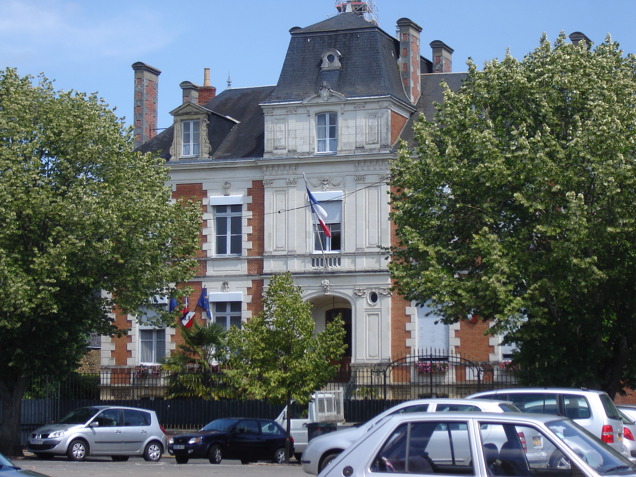 Photo de la Sous-Préfecture de La Flèche, vue de la place de la Libération